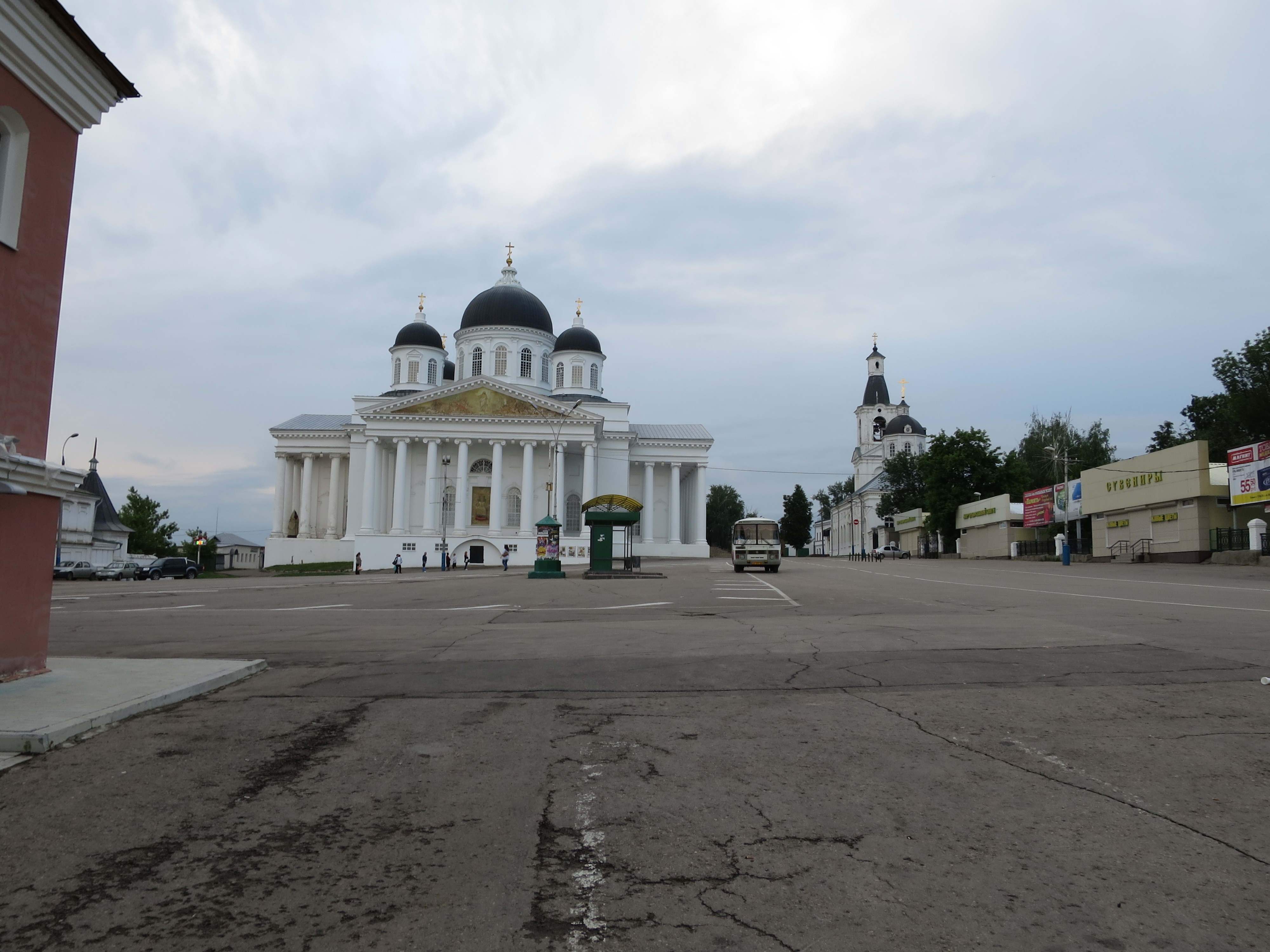 Соборная площадь в Арзамасе